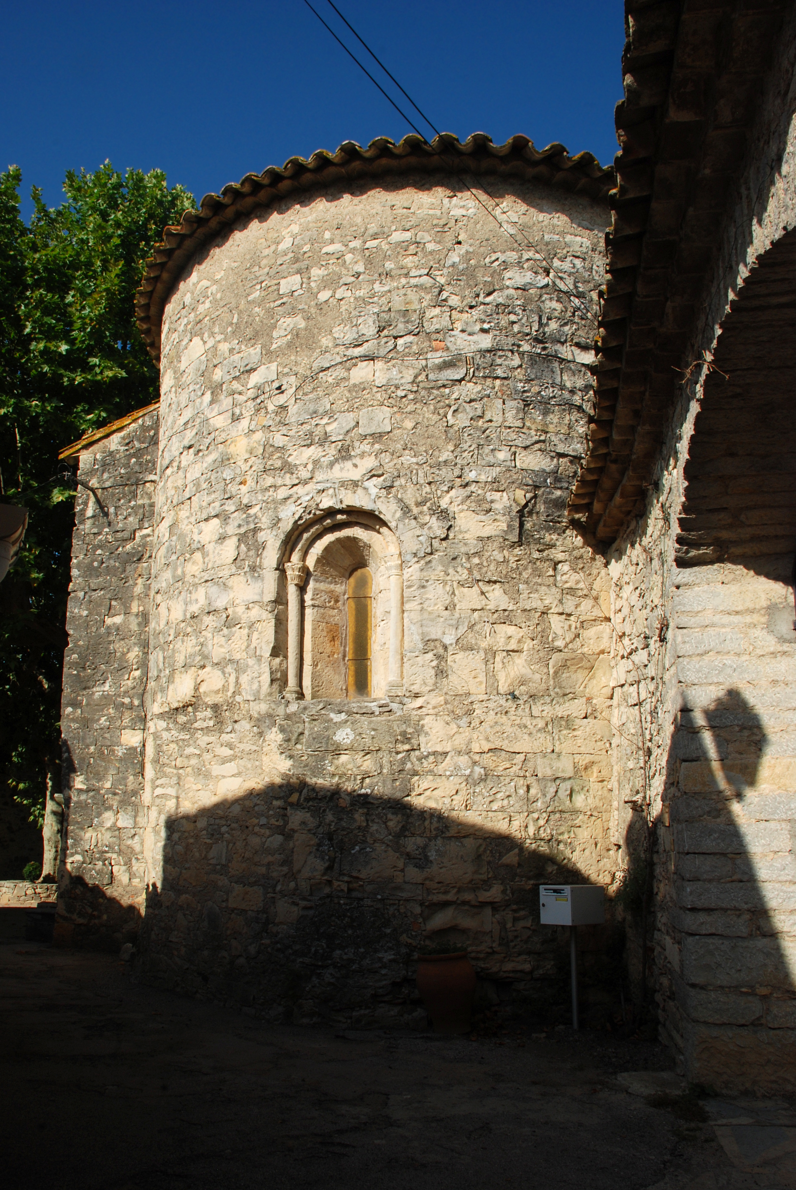 France - Hérault - Église Saint-Martin de Sauteyrargues